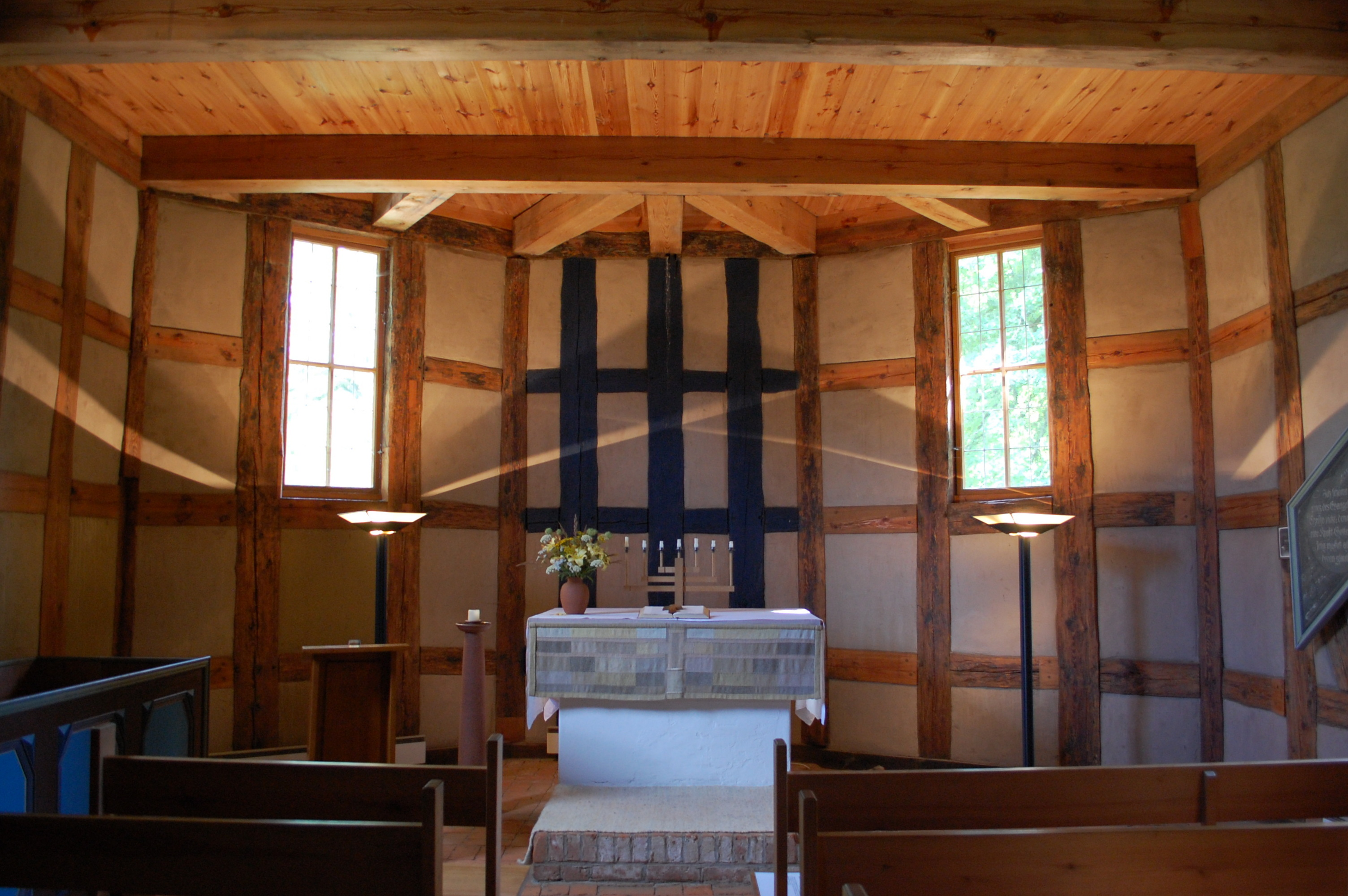 Altar im Kirchlein im Grünen